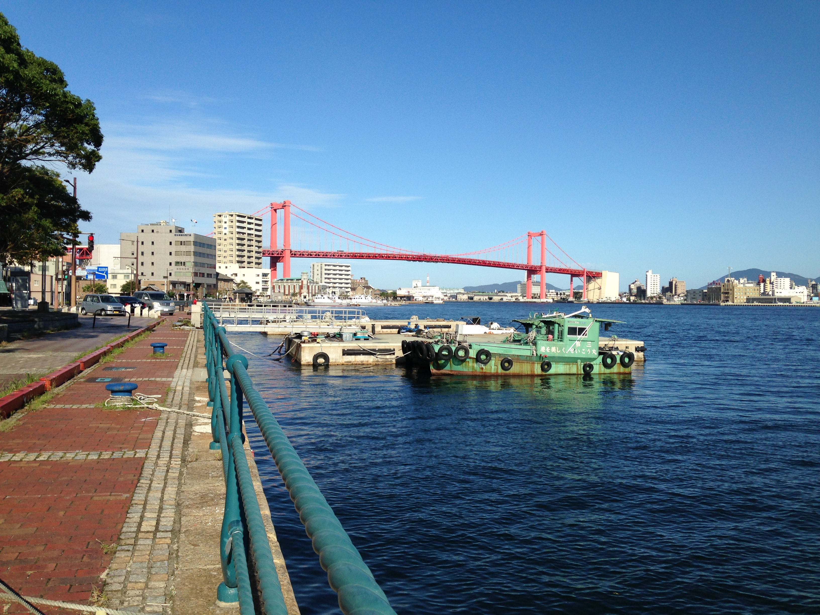 北九州港若松ふ頭より望む洞海湾と若戸大橋